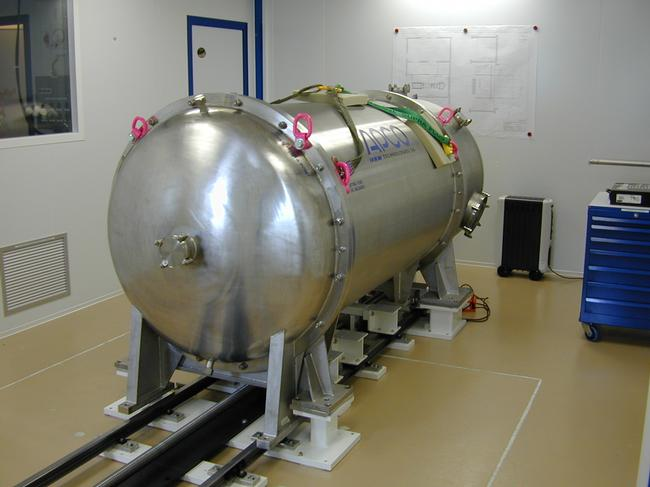 Spektrograf HARPS.